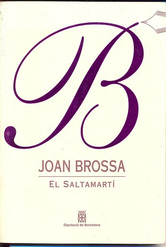 Coberta de l'edició de la Diputació de Barcelona, del 1999